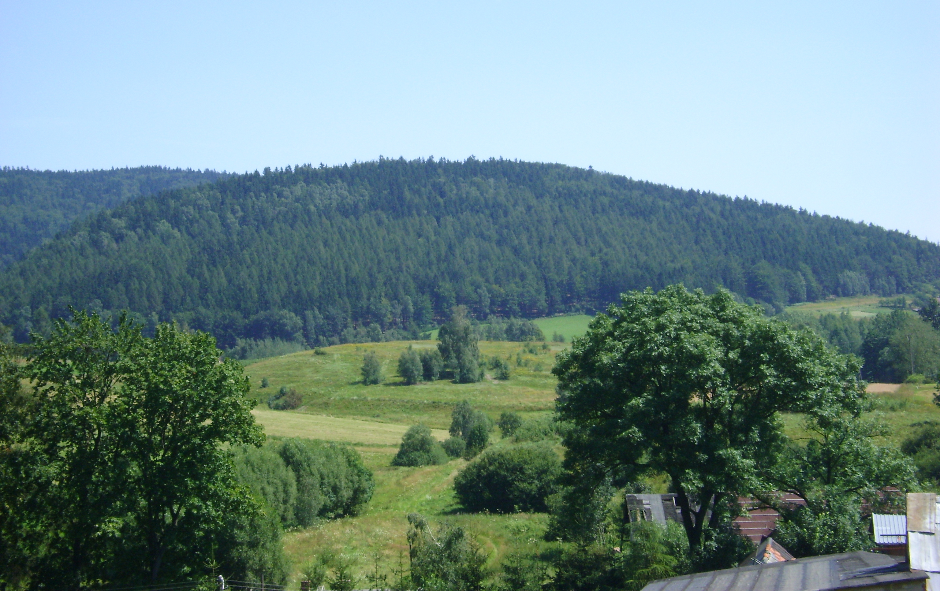 Lirnik - wzniesienie w południowo-zachodniej Polsce Górach Sowich w woj. dolnośląskim